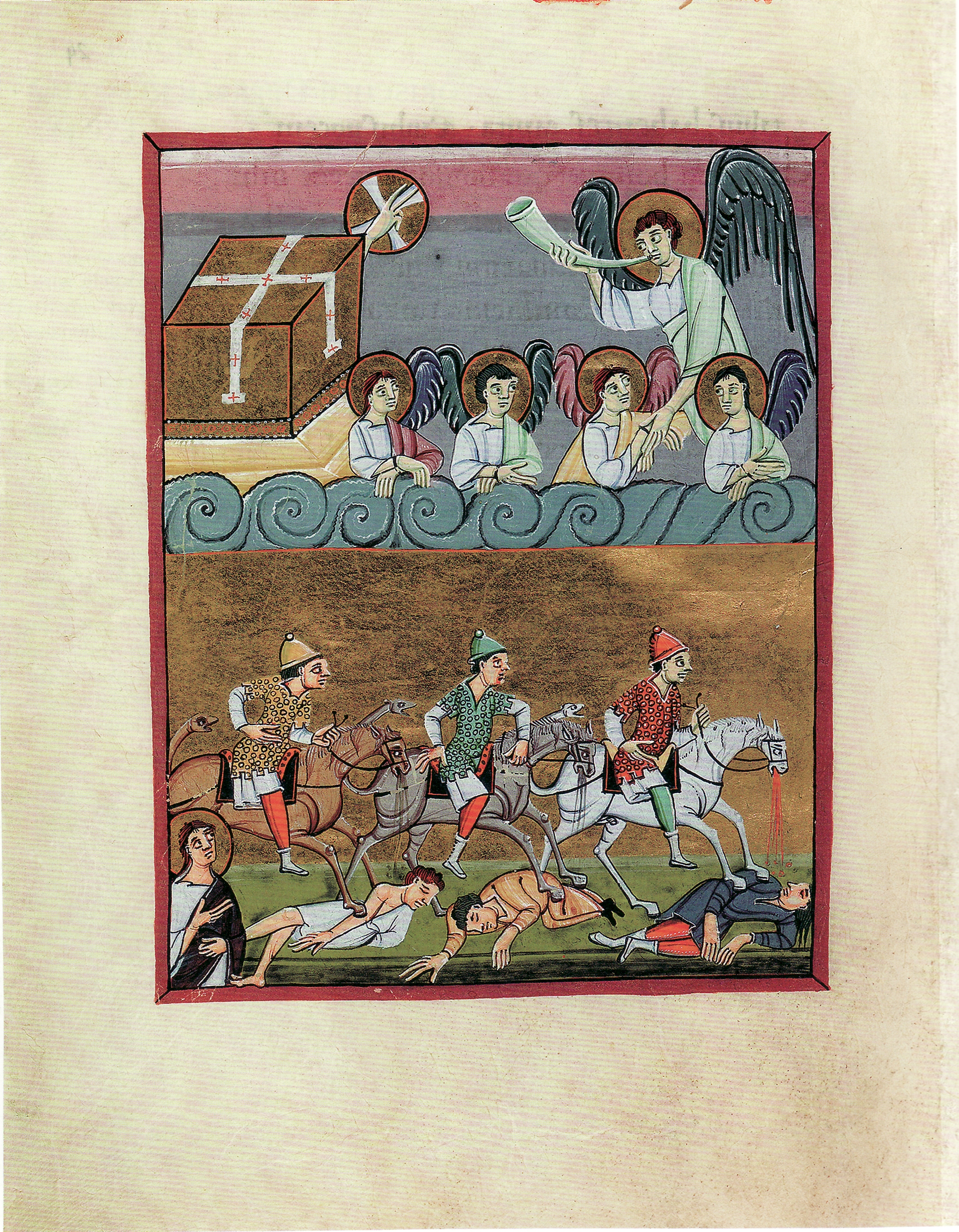 Die sechste Posaune der Offenbarung des Johannes